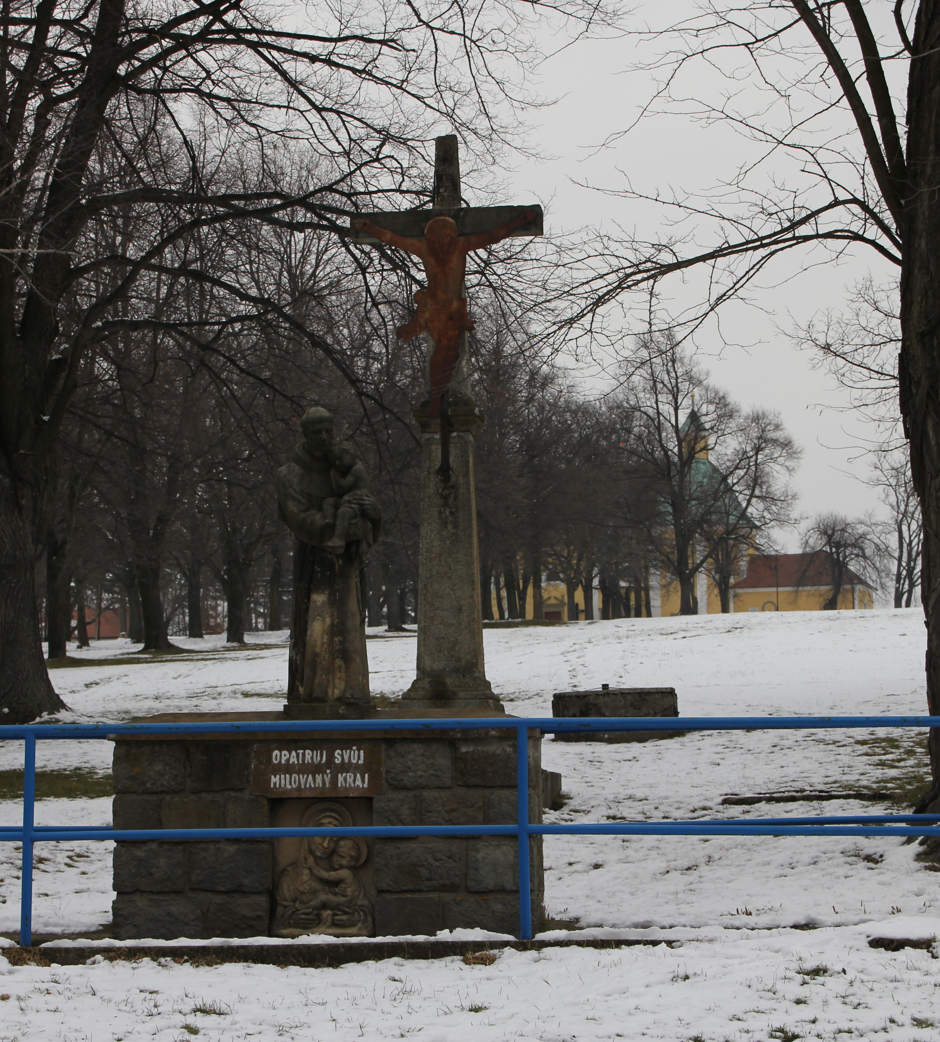 Kříž, socha sv. Antonína Paduánského a zábradlí nad studánkou pod vrcholem Antonínského kopce (mezi Ostrožskou Lhotou a Blatnicí pod Svatým Antonínkem), jihozápadně od poutní kaple sv. Antonína Paduánského viditelné v pozadí.